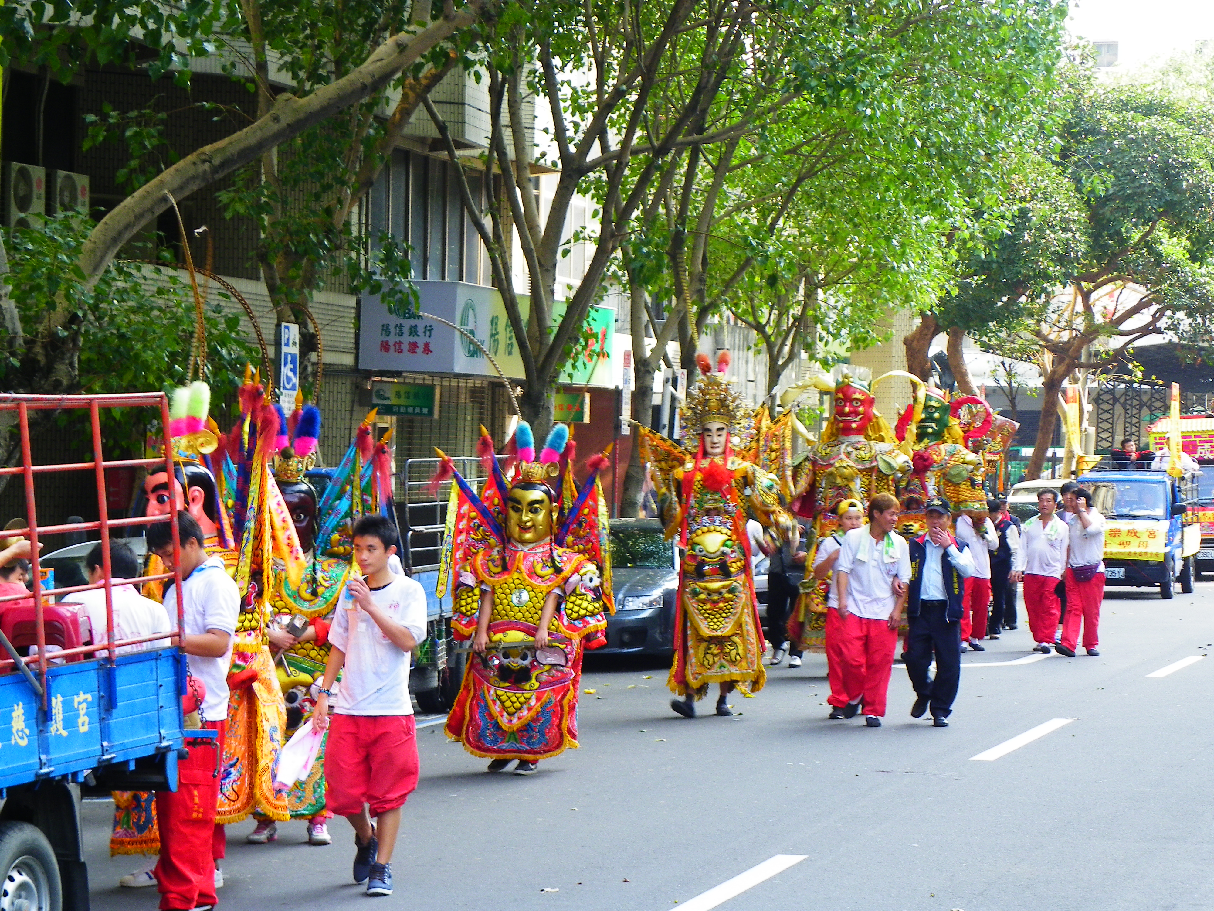 中文（台灣）: 松山慈祐宮建宮260週年紀念媽祖遶境，金包里慈護宮神將隊。